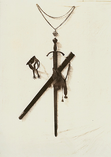 Épée de Godefroy de Bouillon - Jerusalem.